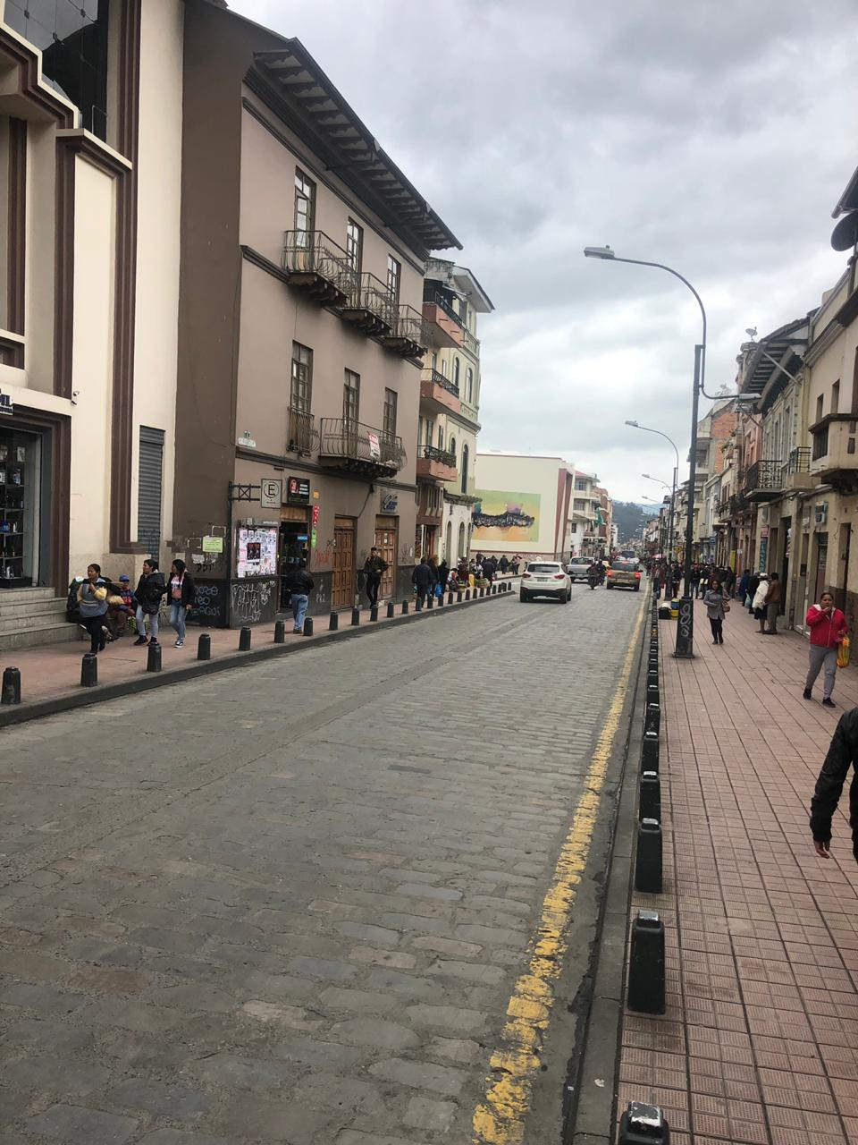 Inicios de la Calle Larga